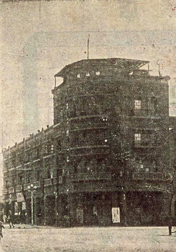 經營台灣料理的醉仙閣，後來由台南州商工經濟會，戰後為台南市商業會所屬。